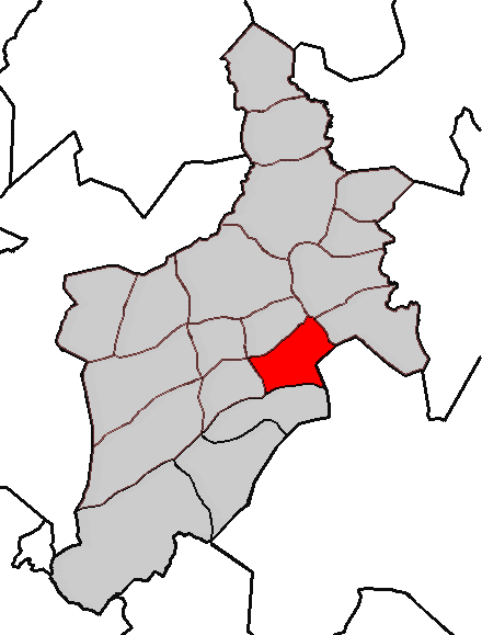 Situación da parroquia de Presedo no concello de Abegondo